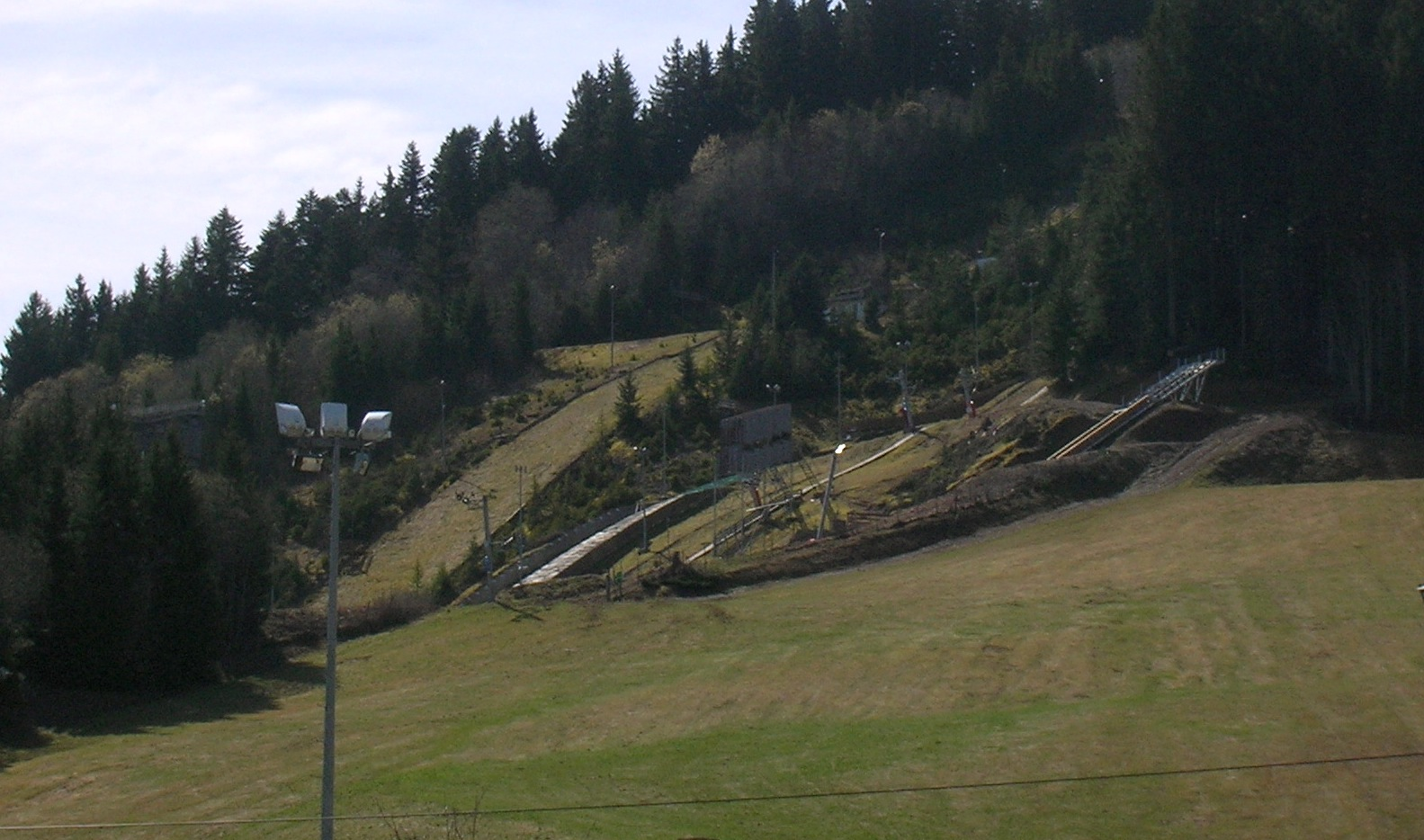 Tremplin au Claret, Autrans Méaudre en Vercors, Isère, AuRA, France.